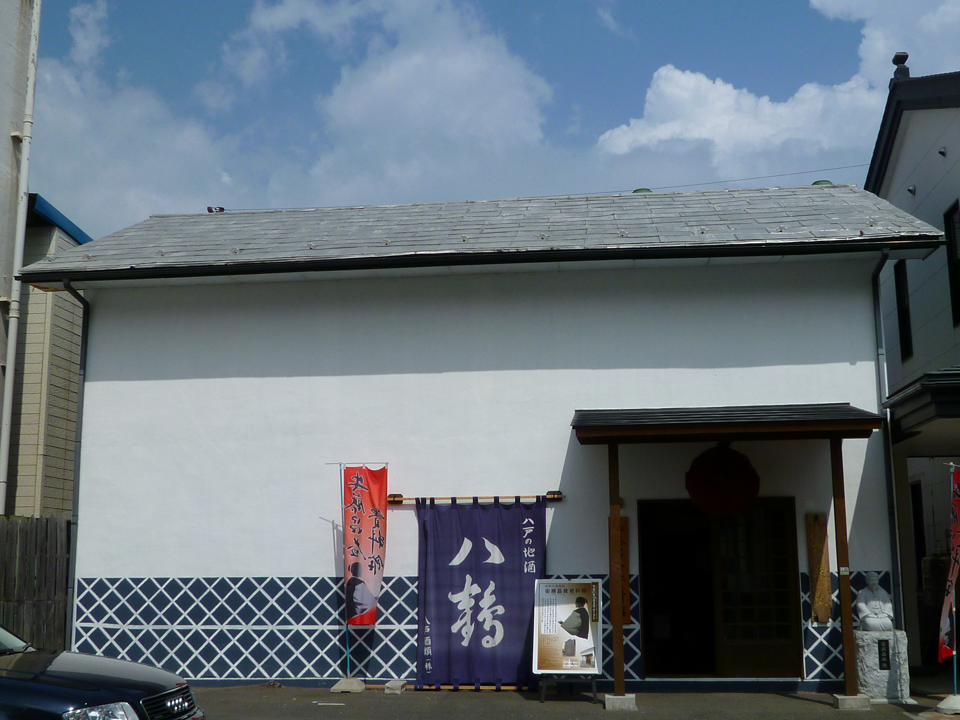 「安藤昌益資料館」外観